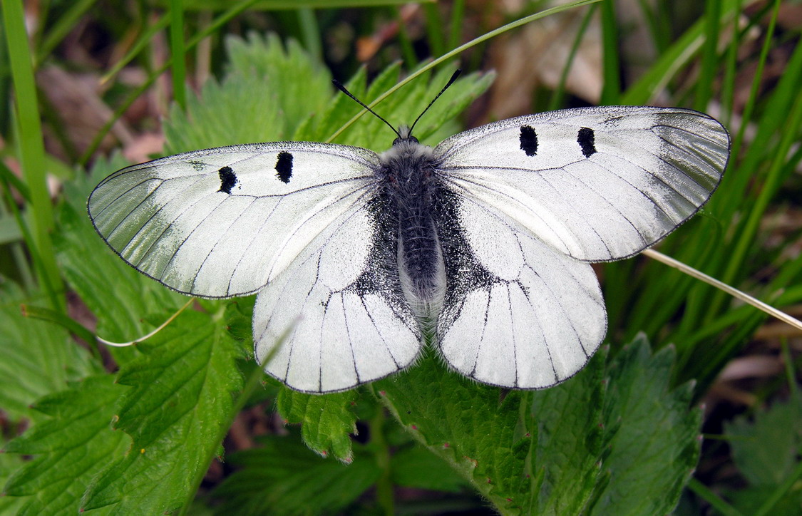 Juodasis apolonas (Parnassius mnemosyne)